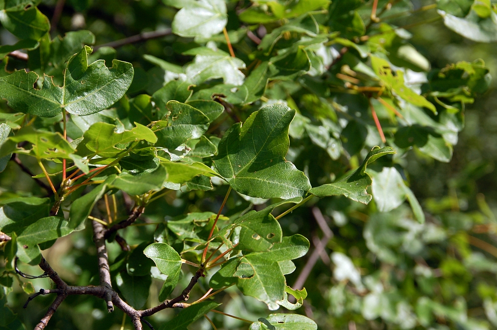 Acer monspessulanum, Kaub, Rheinland-Pfalz, Rhine Gorge, Germany